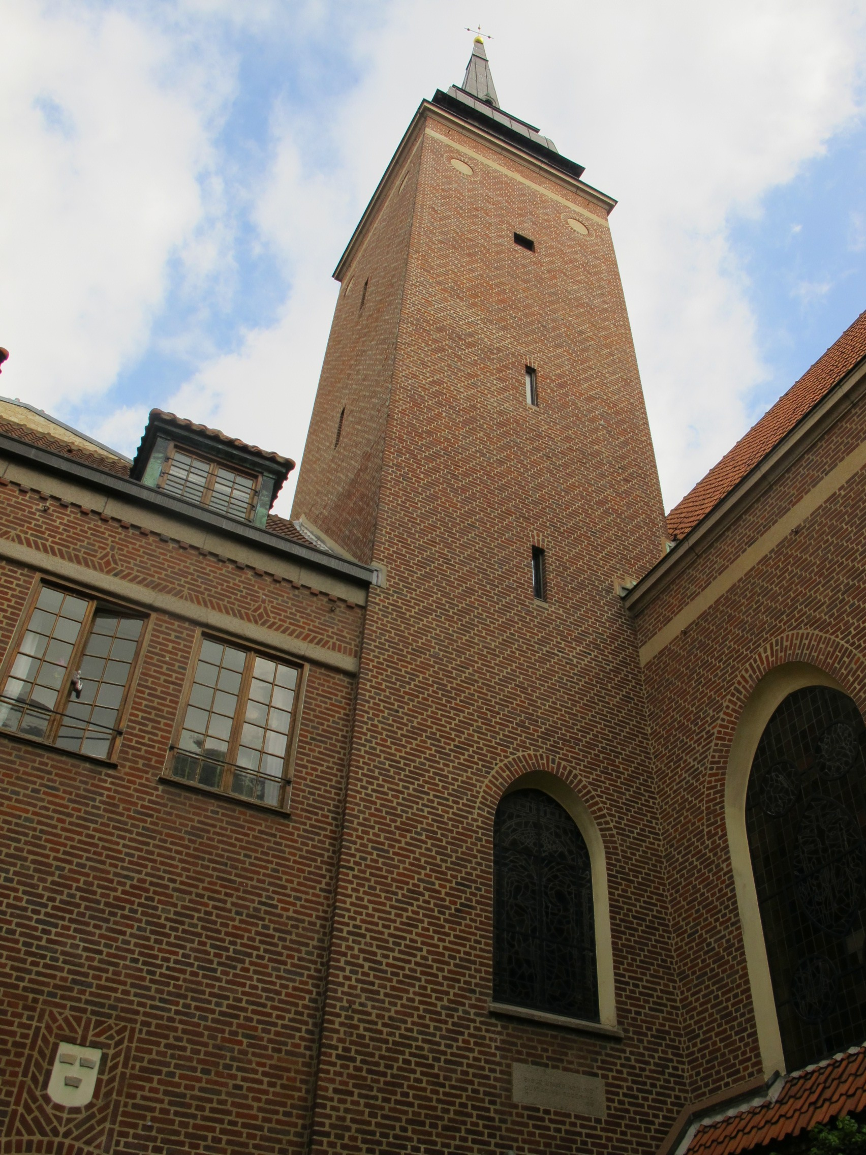 Église suédoise de Paris, Rue Médéric